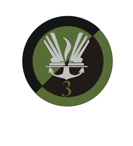 WZÓR GRAFICZNY OZNAKI ROZPOZNAWCZEJ 3. BATALIONU INŻYNIERYJNEGO NA MUNDUR POLOWY